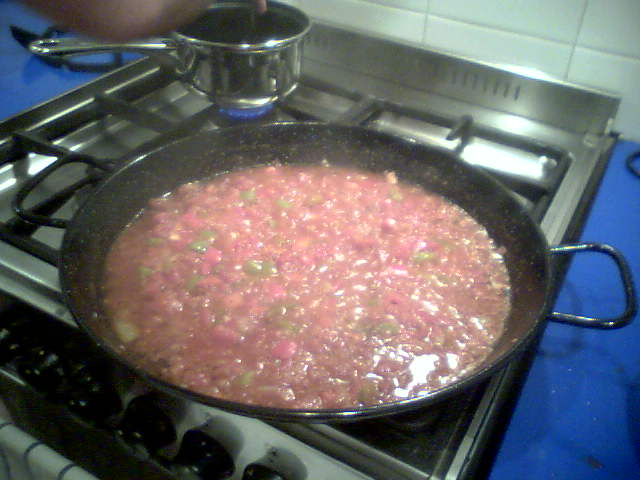 sofrito for paella: 2 April 2007